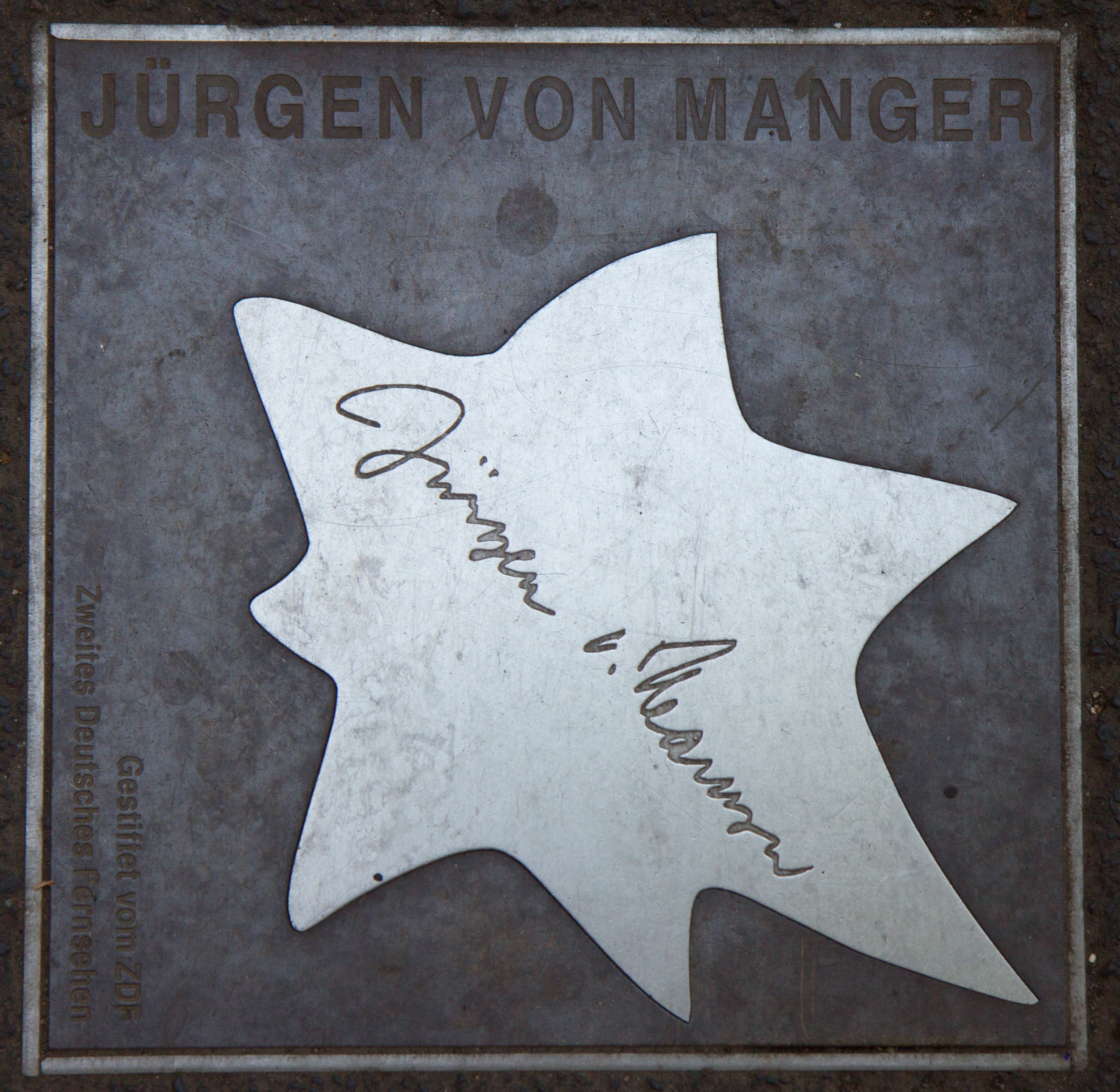 Sterne der Satire - Walk of Fame des Kabaretts in Mainz. Stern Nr. 3 von Jürgen von Manger.